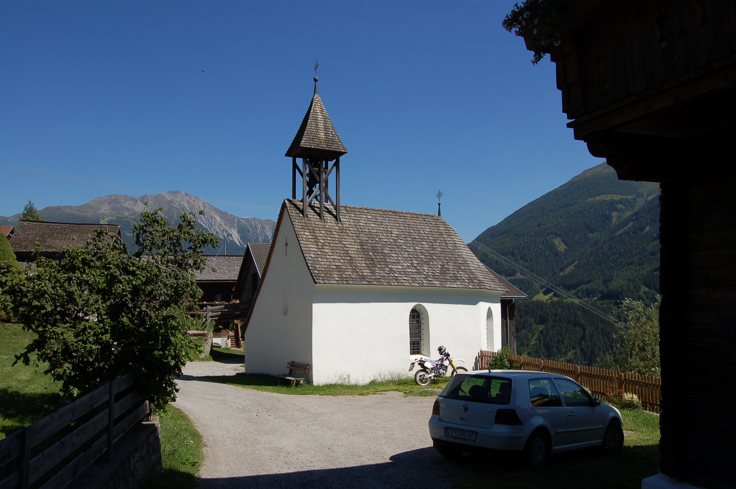 Die Kapelle der Fraktion Zedlach (Gemeinde Matrei in Osttirol)